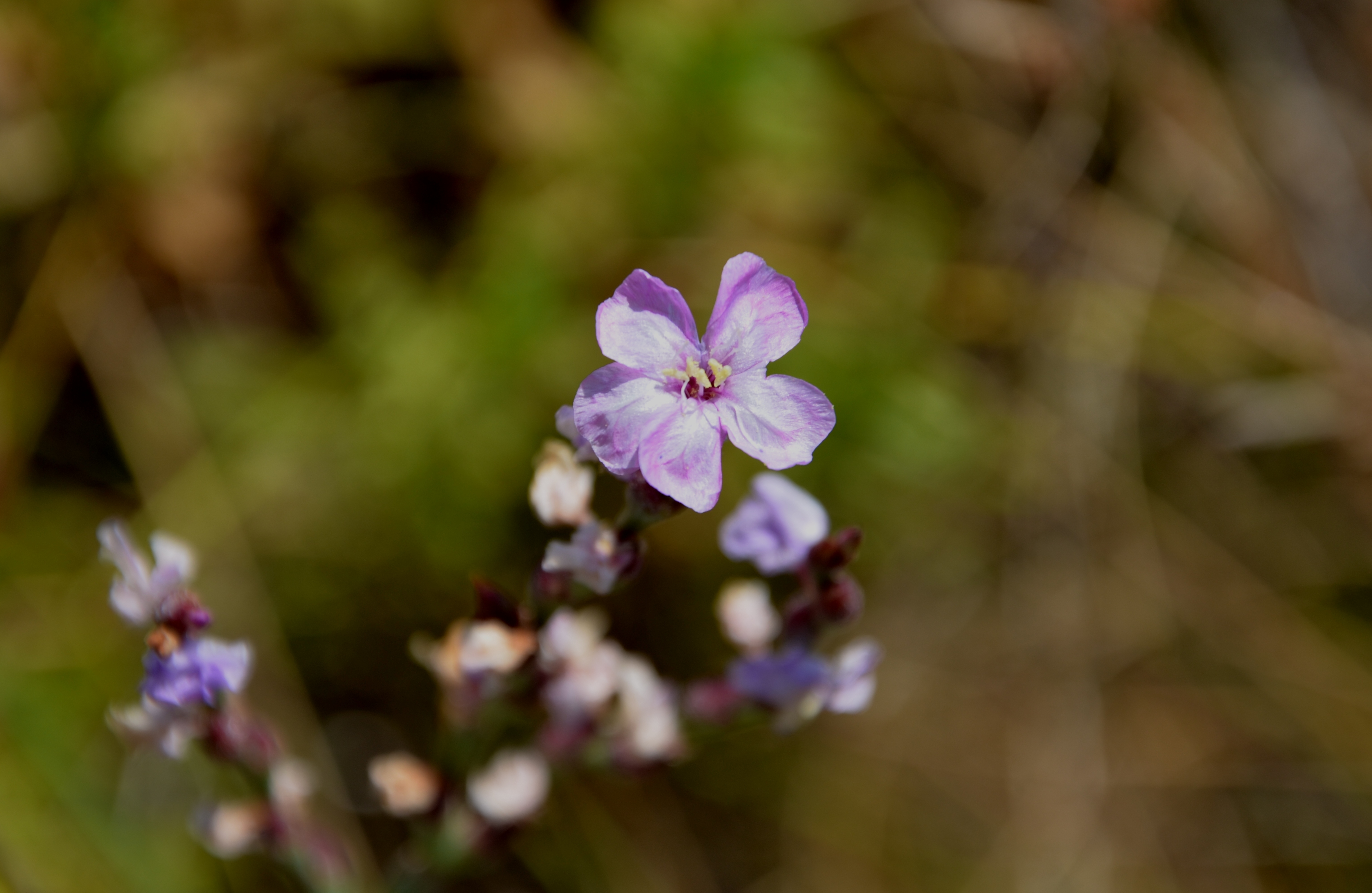 Grand statice (Gruissan) France